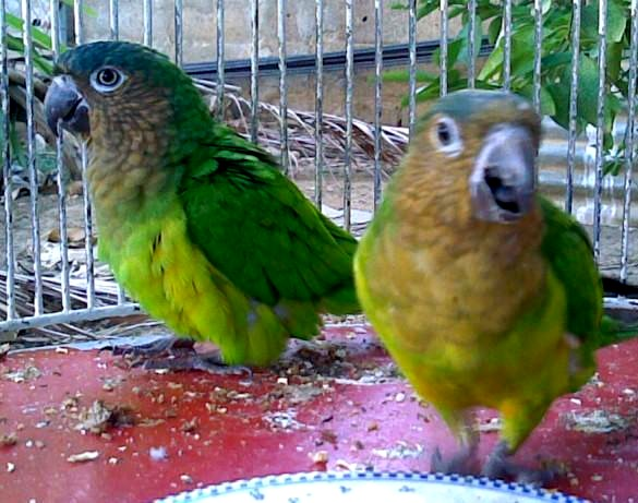 Pericos pintados (Pyrrhura leucotis).